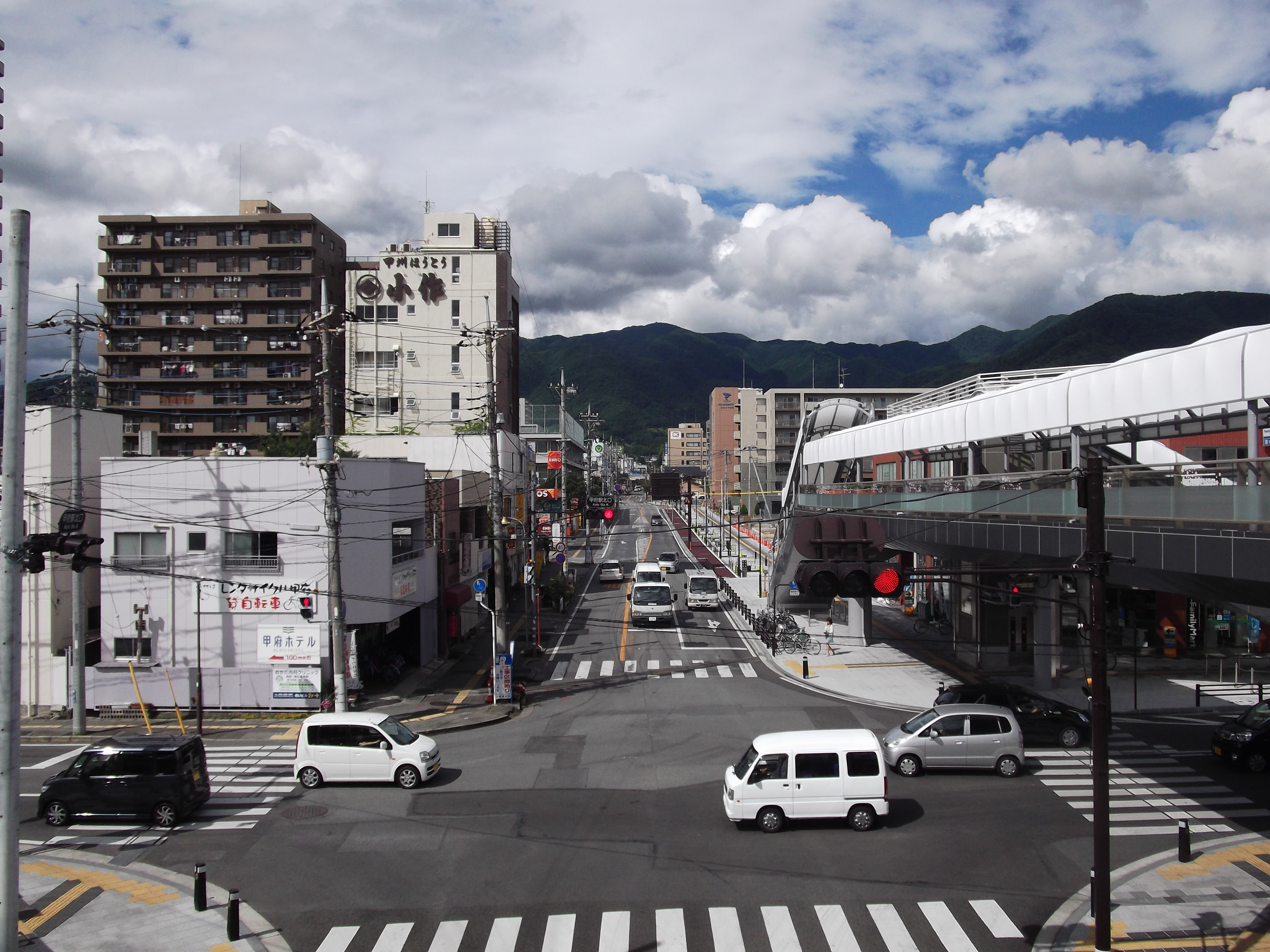 甲府駅北口より、北側の武田通り（山梨県道31号甲府山梨線）を臨む